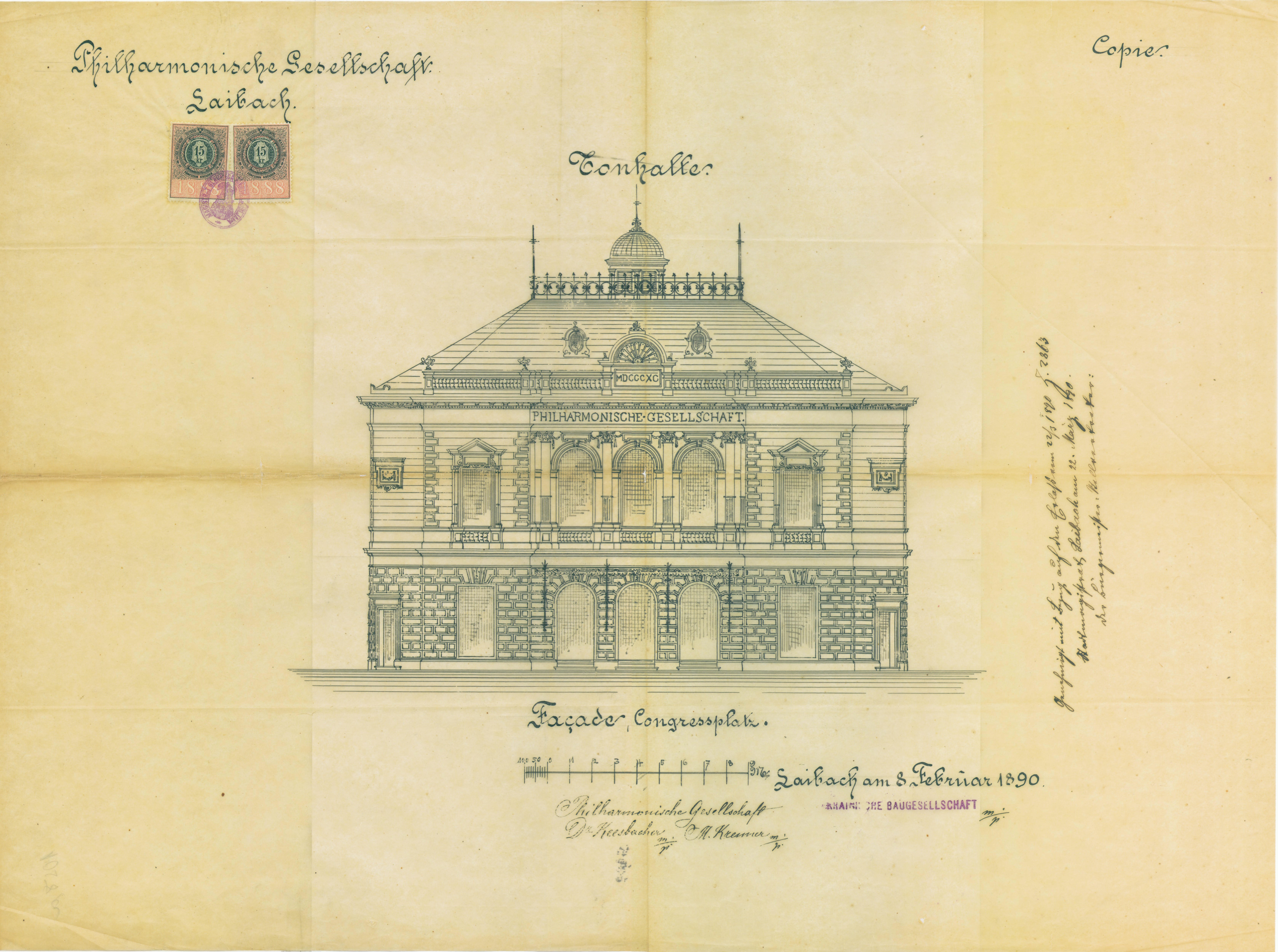 Filharmonija (Tonhalle) na Kongresnem trgu 10; Glavna fasada, projekt Strecken nach den Decken, gradnja